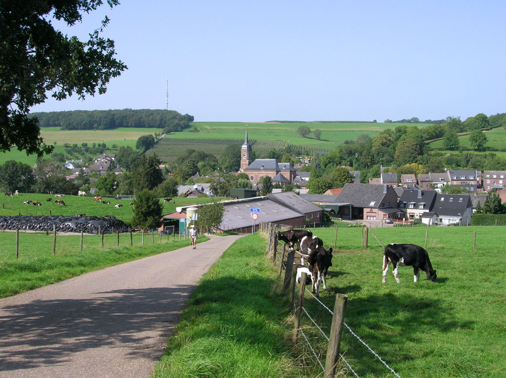 Uitzicht op Eys